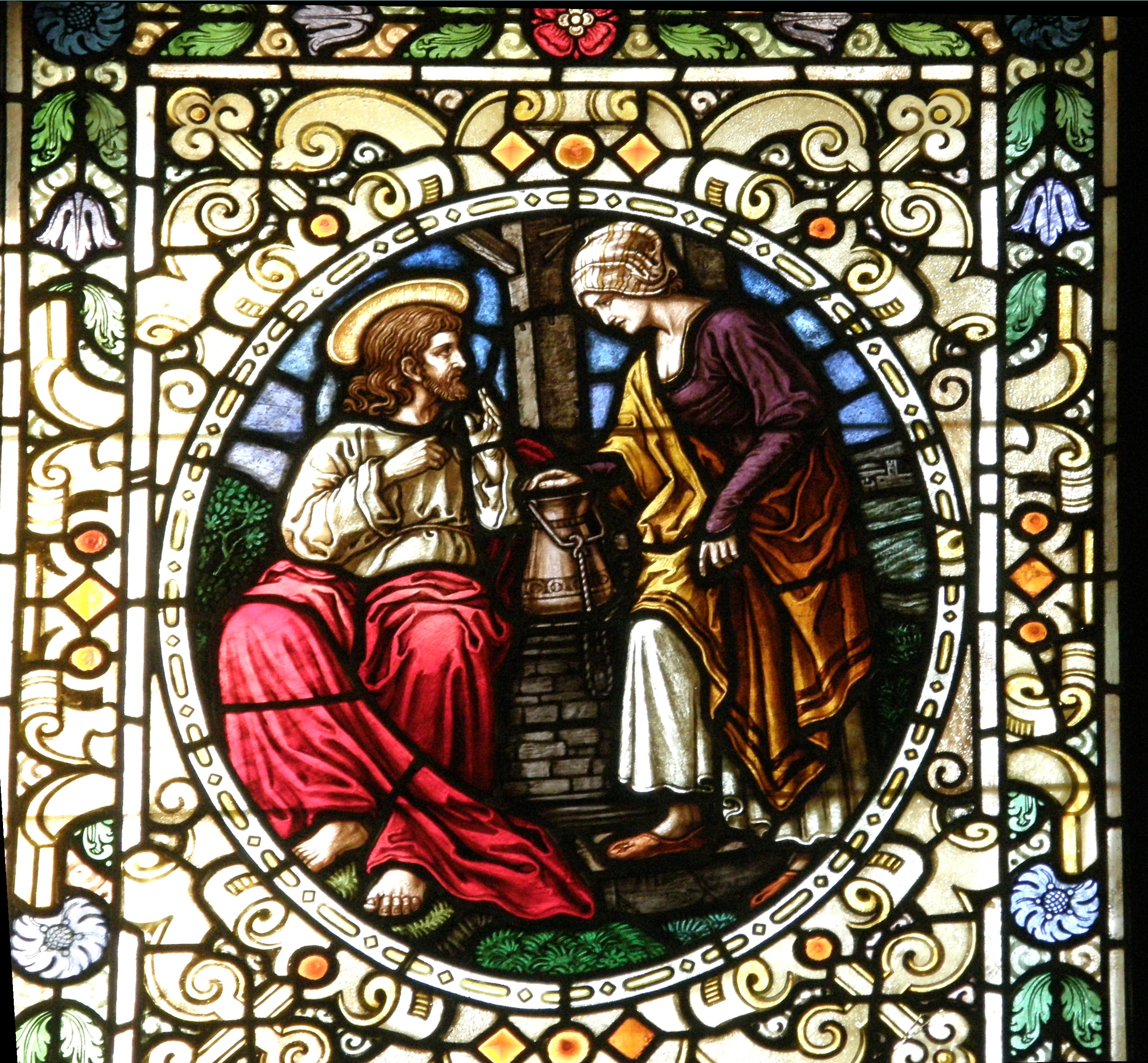 Berlin-Kaulsdorf, Jesuskirche: Altarfenster